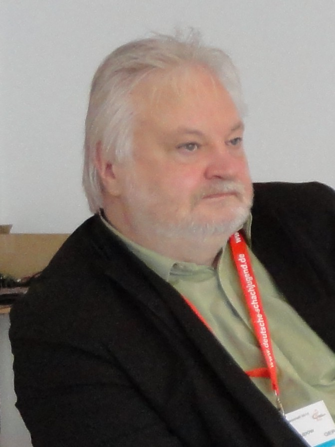 Artur Jussupow, Kommentator bei den Deutschen Einzelmeisterschaften der Deutschen Schachjugend, Willingen (Upland) 2015.